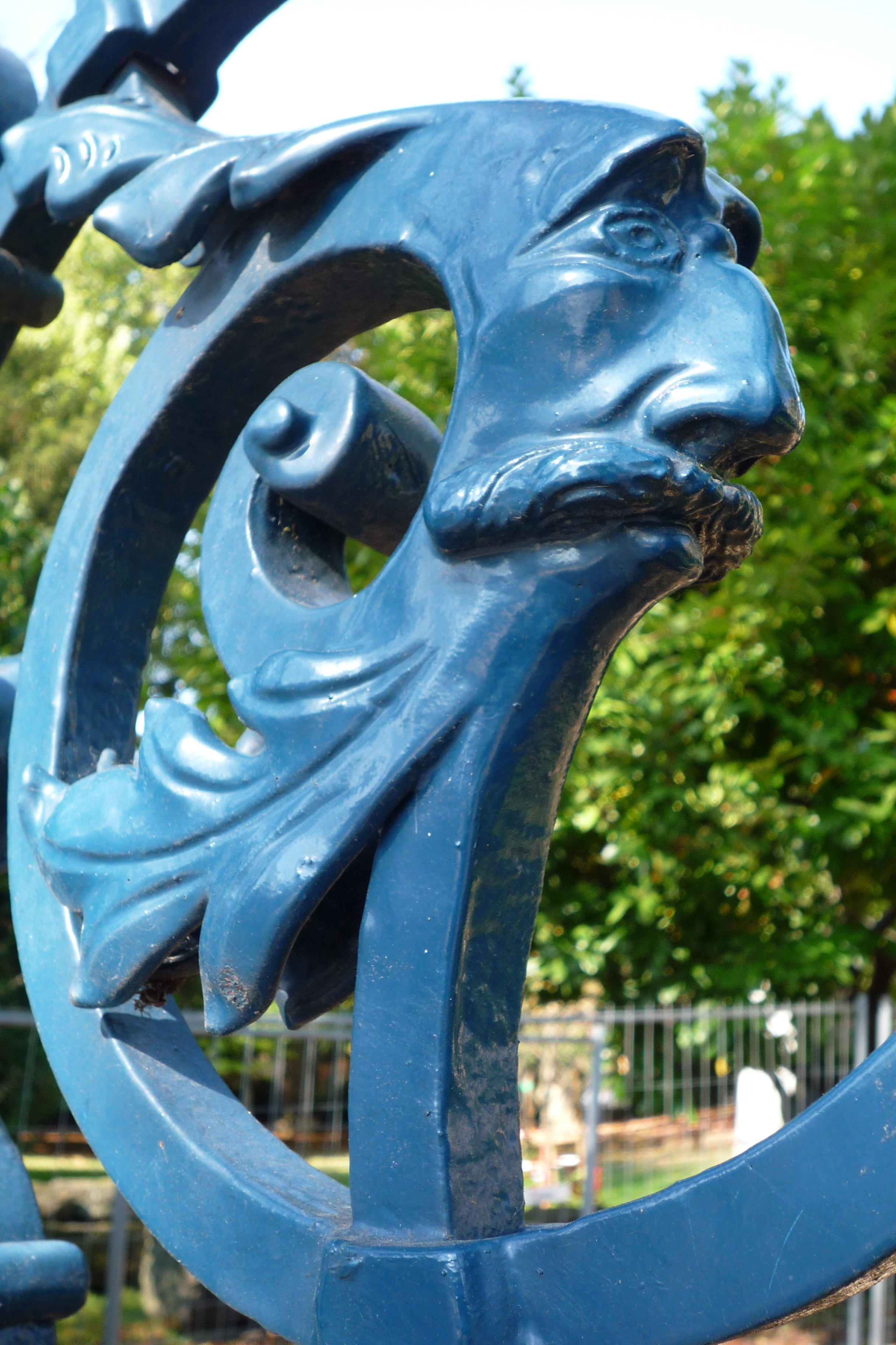 Strasbourg, Palais du Rhin, décor de ferronnerie du parc caricaturant l’empereur Guillaume II de Hohenzollern